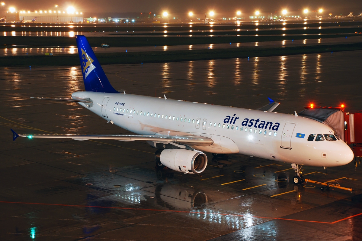 Air Astana Airbus A320-200